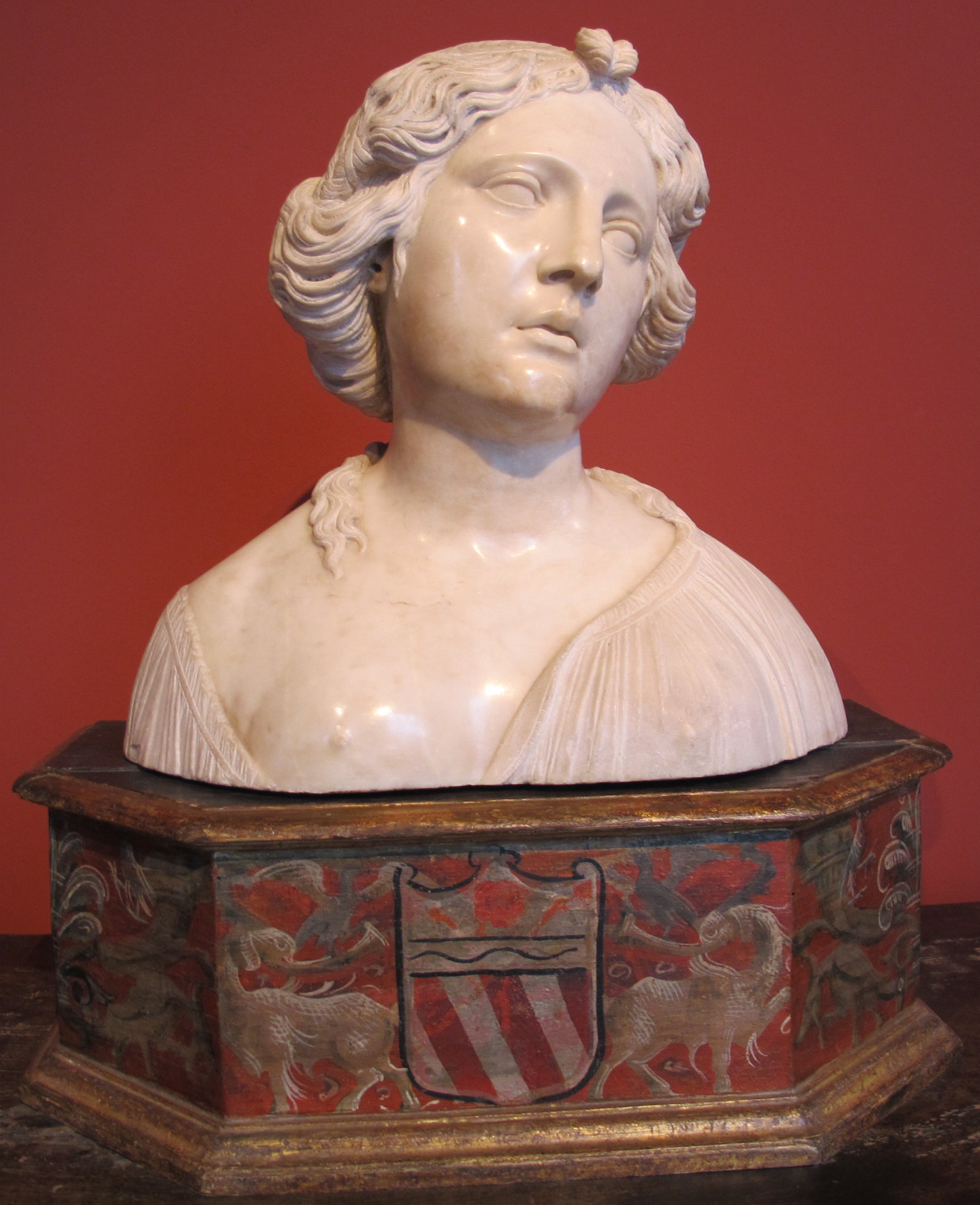 Ritratto di giovane ragazza, Venezia, c. 1520. Bode-Museum Berlin